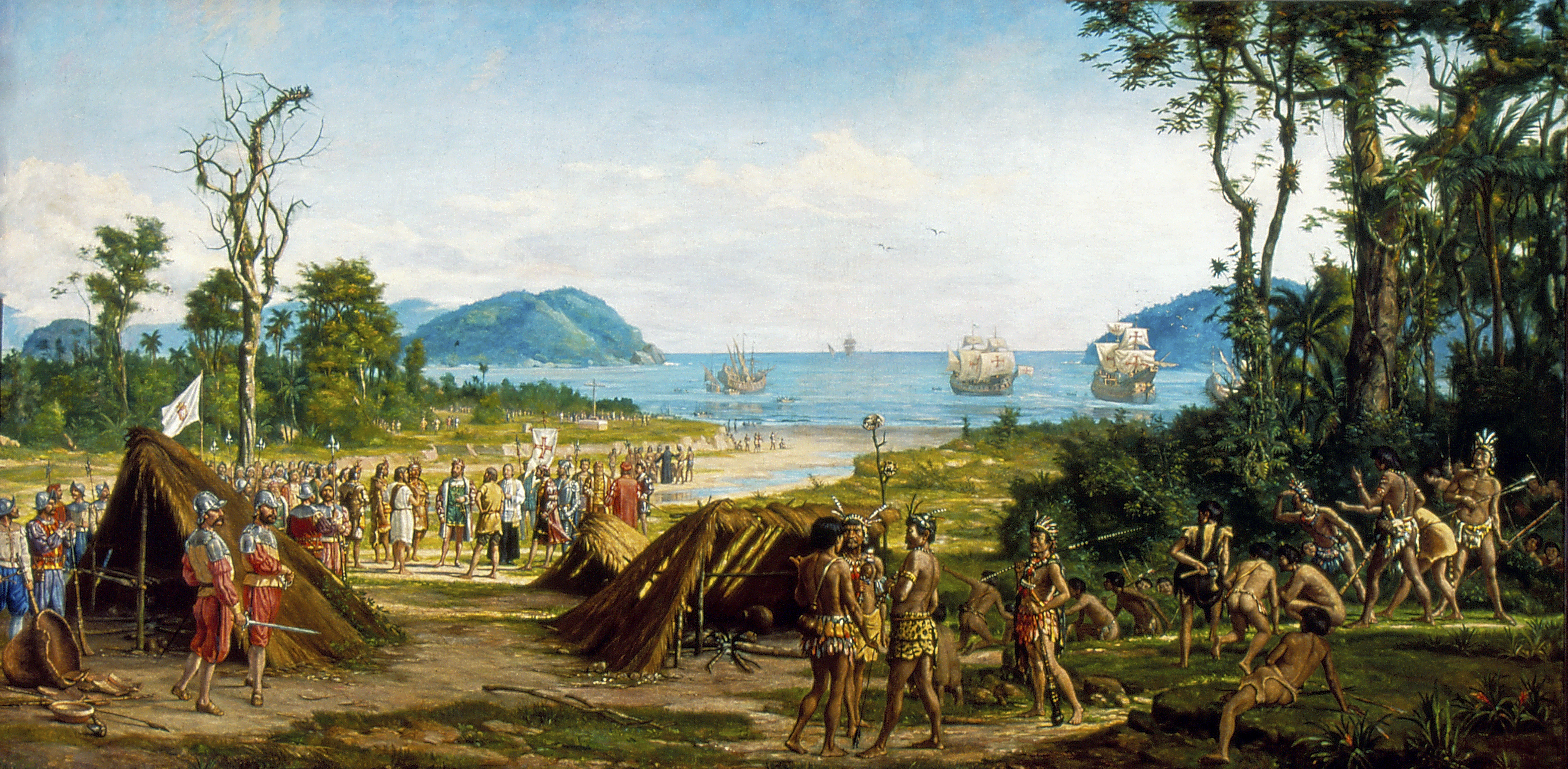 Obra que integra o acervo do Museu Paulista da USP. Coleção Benedito Calixto de Jesus - CBCJ